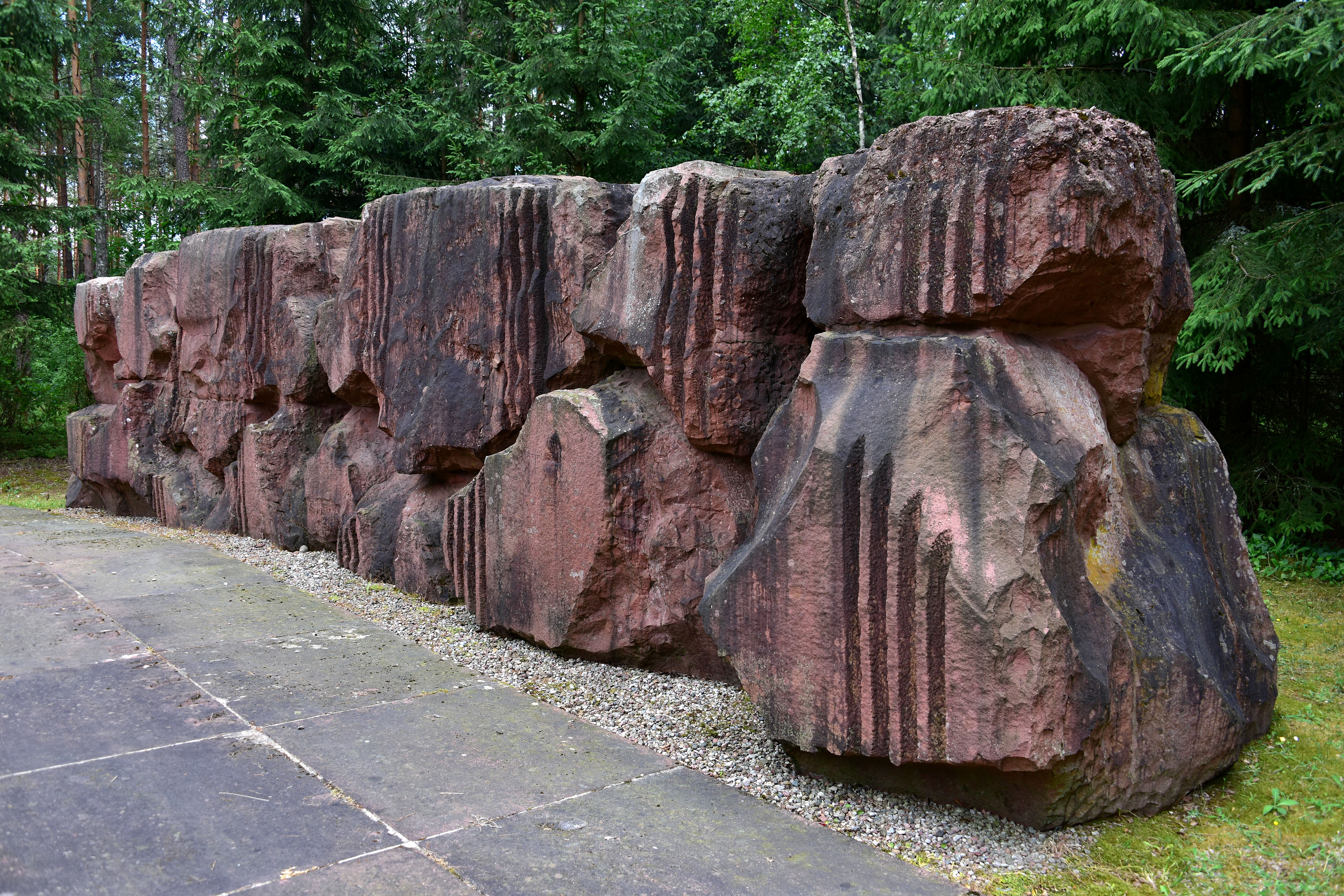 Pomnik Ofiar Obozu Pracy w Treblince